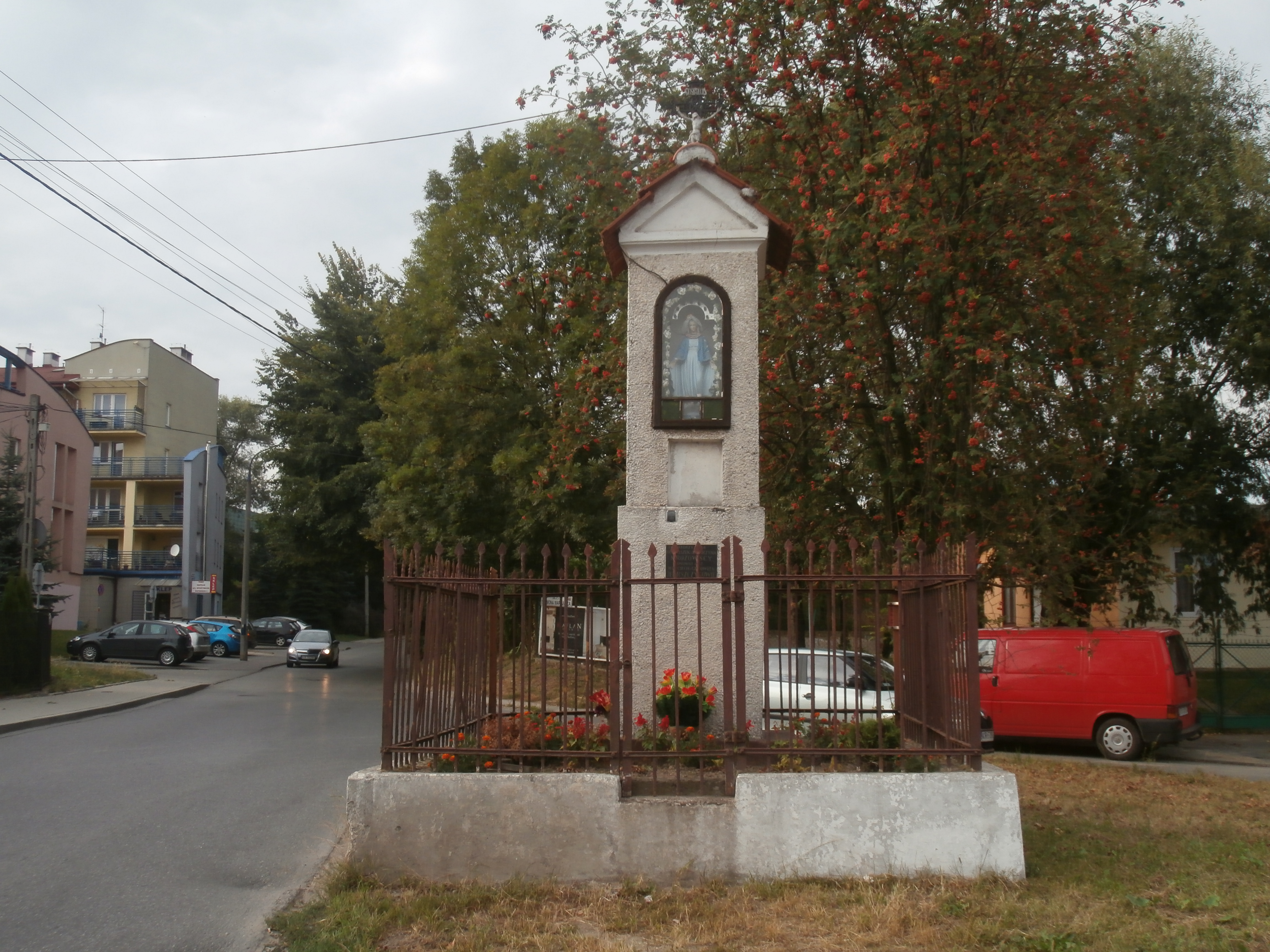 Kapliczka MB w dawnym centralnym miejscu wsi Mistrzejowice (obecznie w granicach Krakowa).